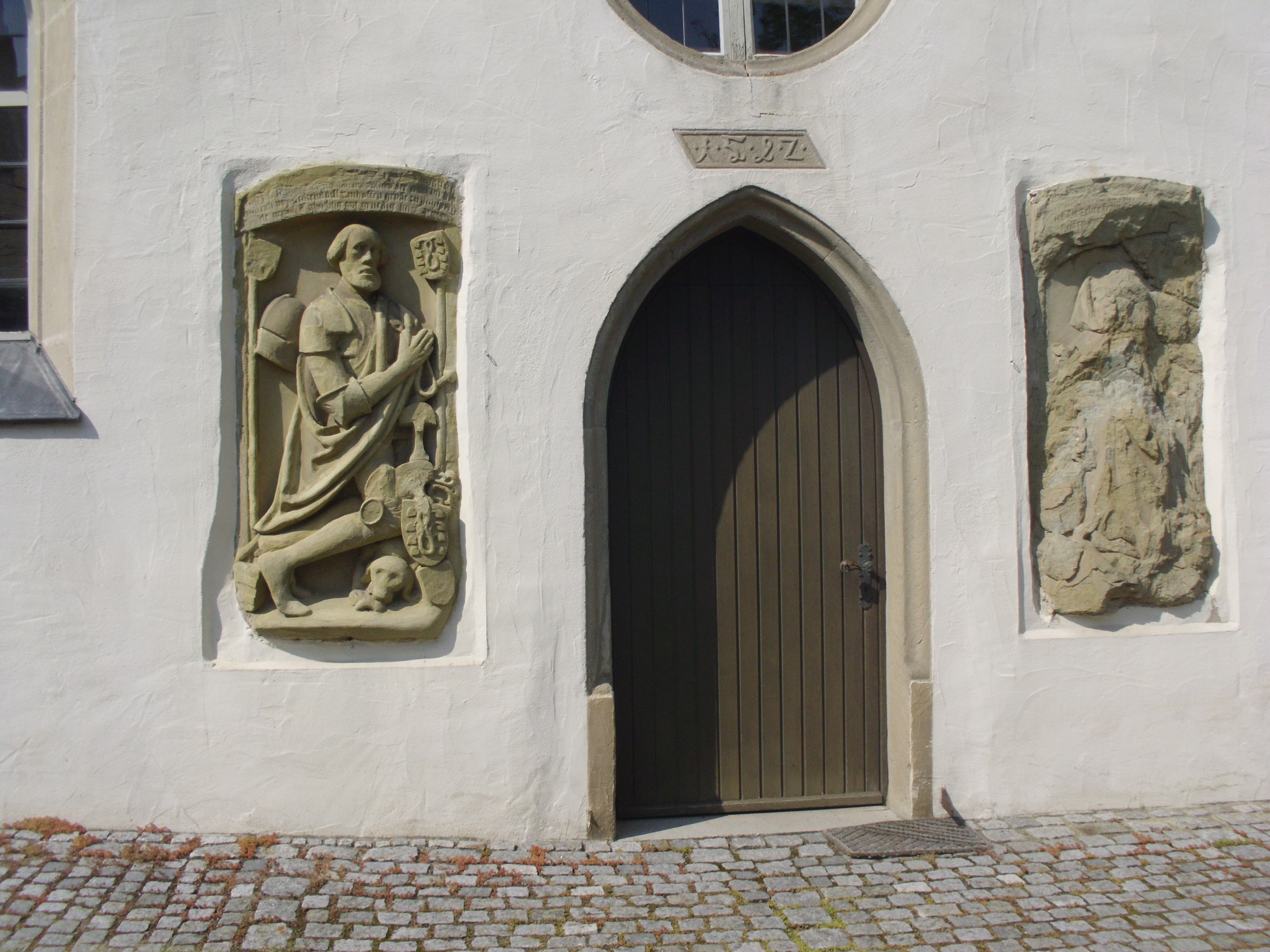 Jochsberg, Ortsteil von Leutershausen im Landkreis Ansbach, Seckendorff-Grabsteine des 15. Jahrhunderts am Kirchenportal